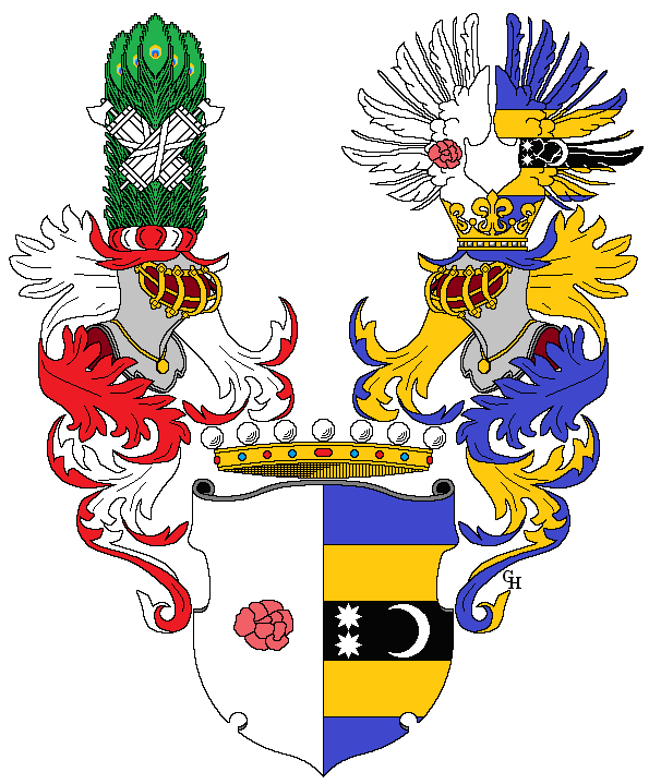 Wappen des kursächsischen Hofrates Karl von Welck (1743–1809), verliehen anlässlich seiner Erhebung in den Reichsfreiherrenstand durch den Reichsvikar Kurfürst Friedrich August III. von Sachsen 1792. Zeichnung von Gerd Hruška (